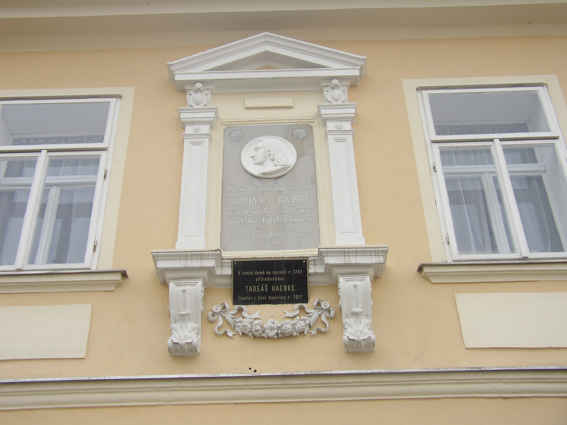 Pamětní deska na rodném domě Tadeáše Haenkeho v Chřibské